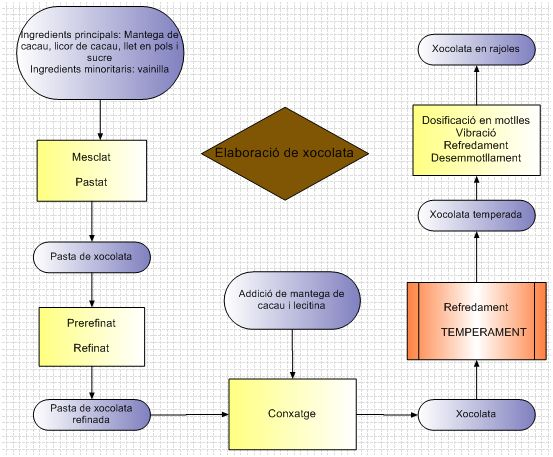 Diagrama de flux del procés d'elaboració de la xocolata on es remarca l'etapa del temperament de la xocolata.